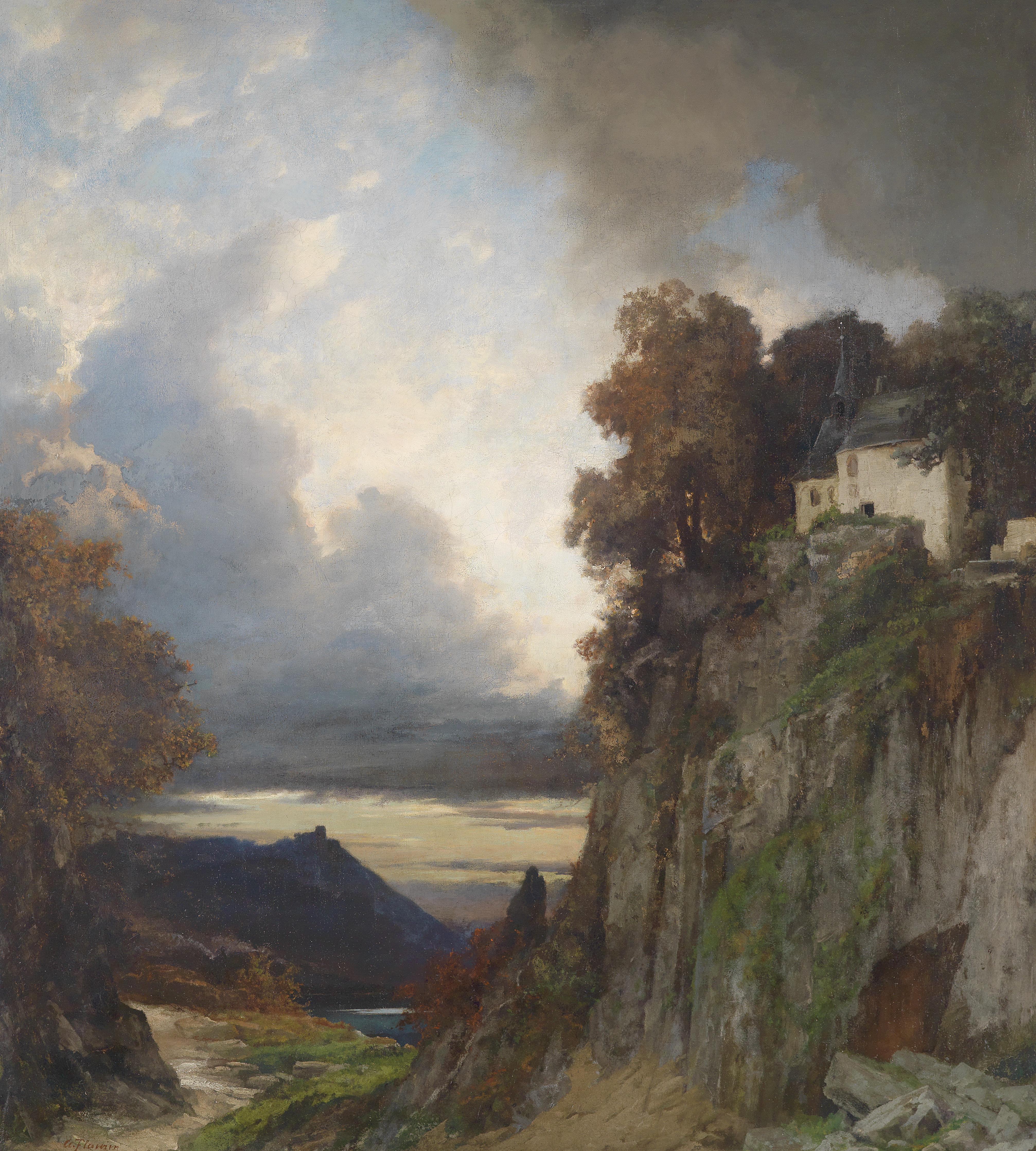 Abendstimmung am Rhein (bei Koblenz)